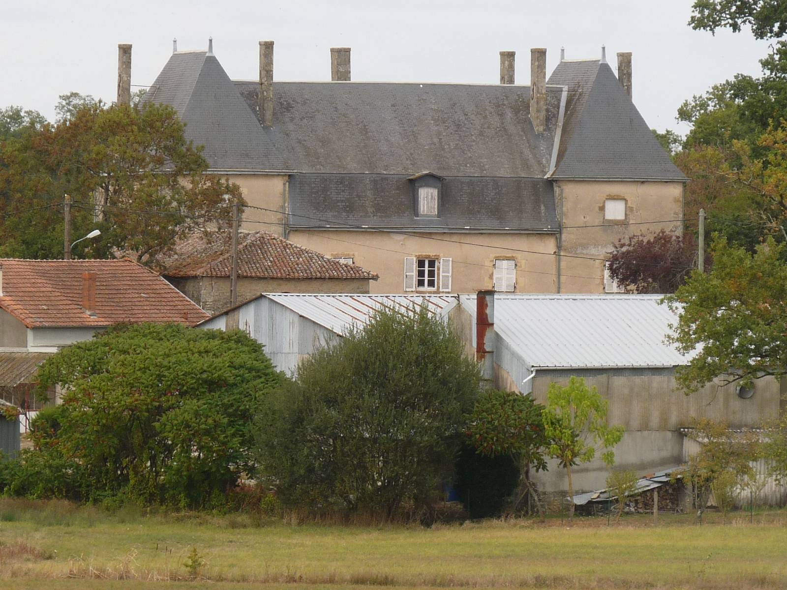 château de Pleuville (au bourg), Charente, France